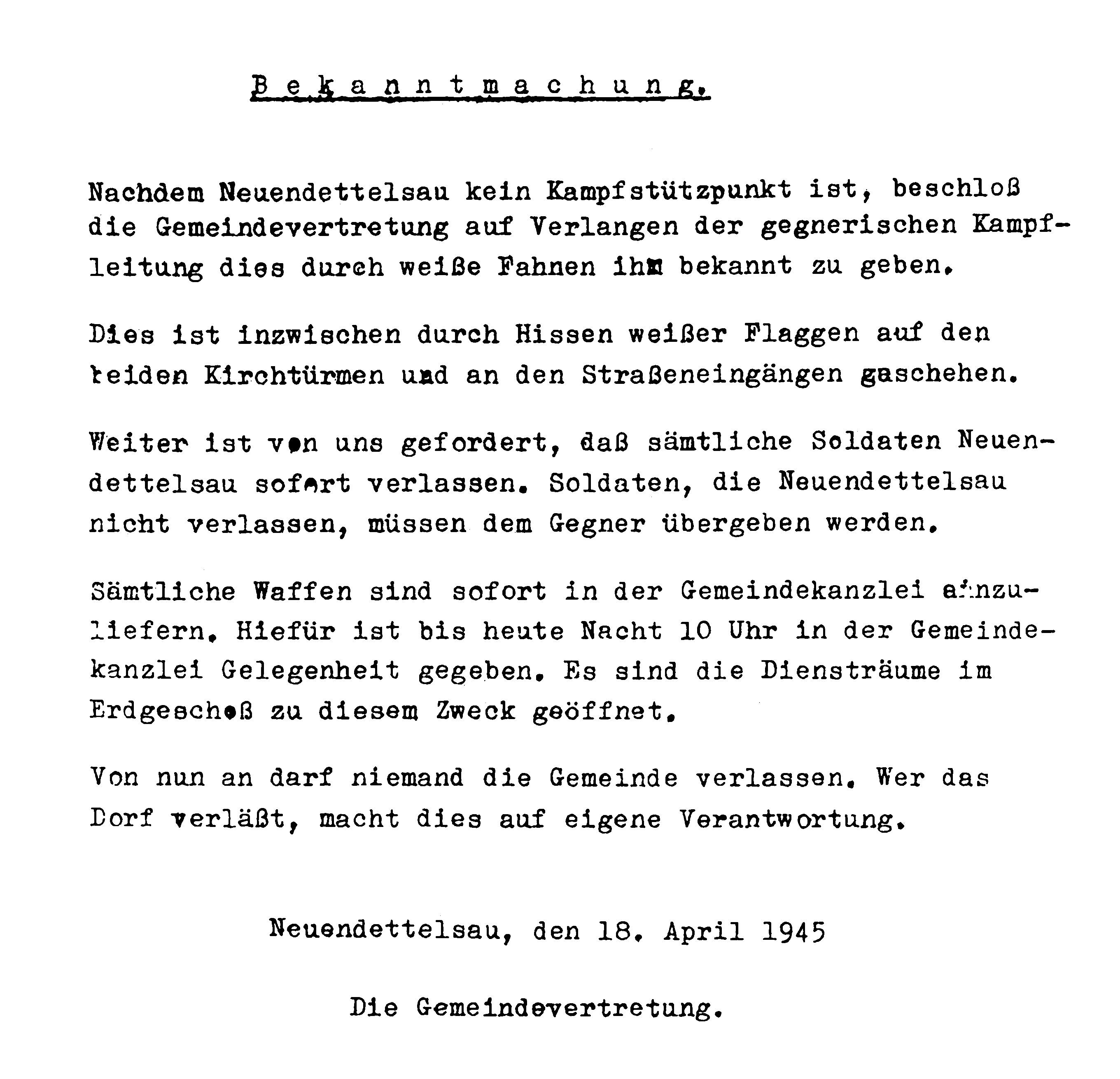 Öffentliche Bekanntmachung vom 18. April 1945 über das Hissen der weißen Fahnen